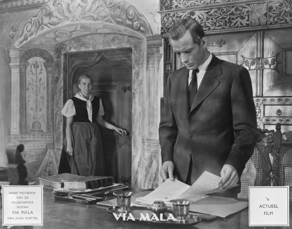 Actueel film repros Via Mala: Karin Hardt, Viktor Staal